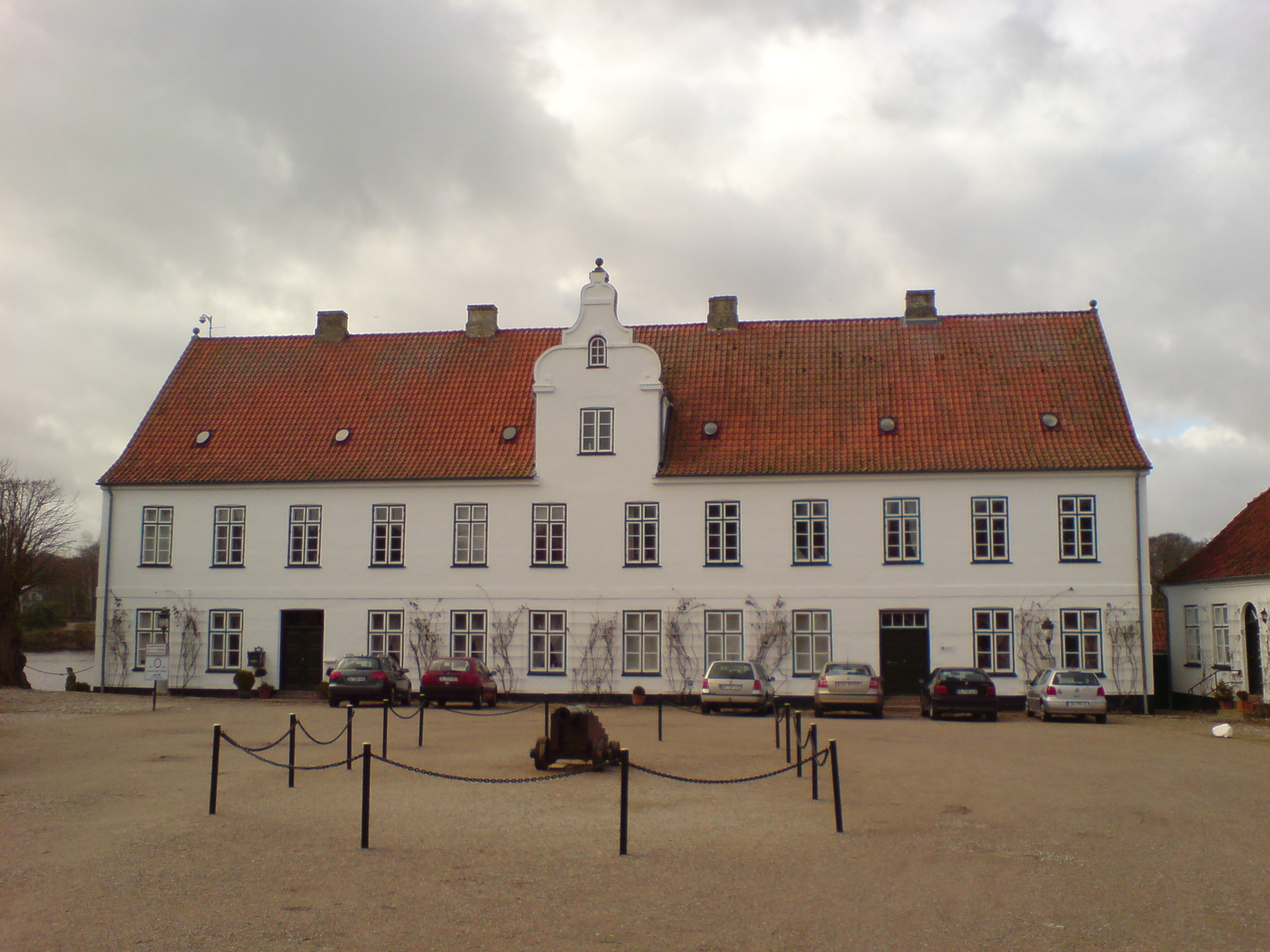 Description=Kavaliershaus Glücksburg Source=myself Date=03.2008 Author=PodracerHH 20:08, 2 March 2008 (UTC)